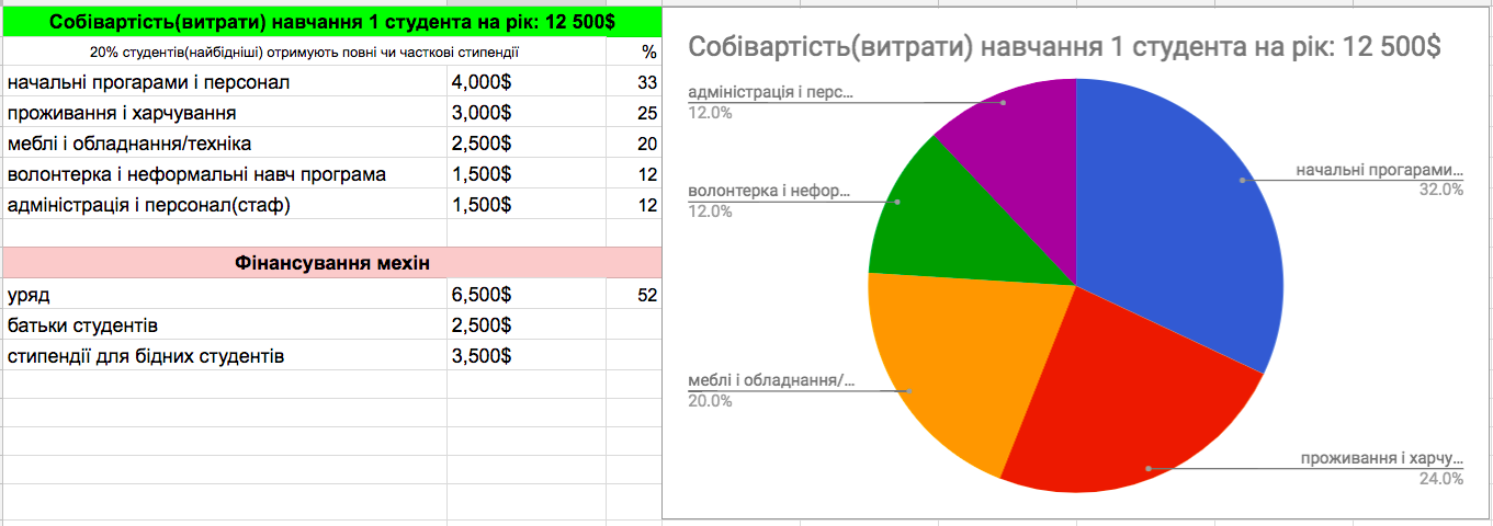 Джерела фінансування та вартість навчання у мехінах на 1 студента в рік.